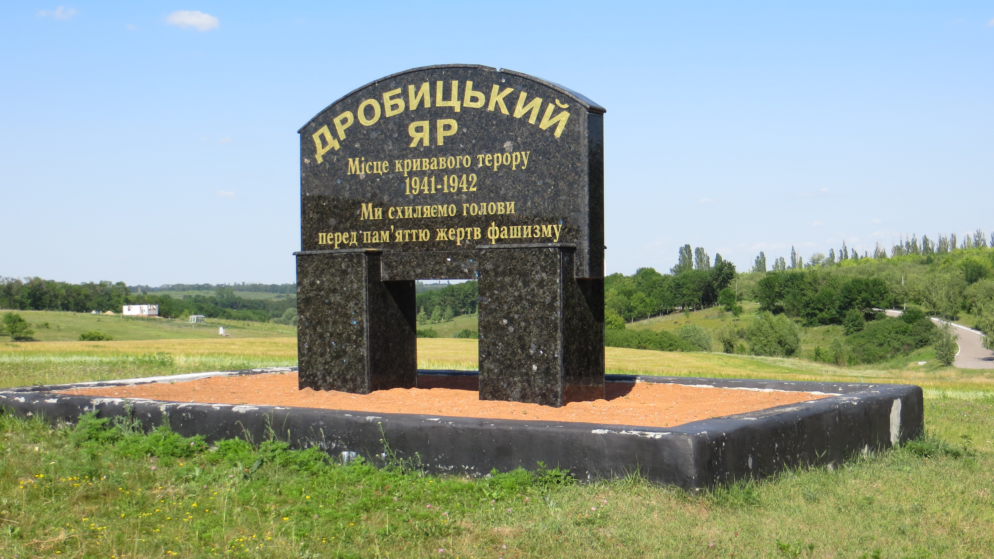 Мемориальный комплекс Дробицкий яр